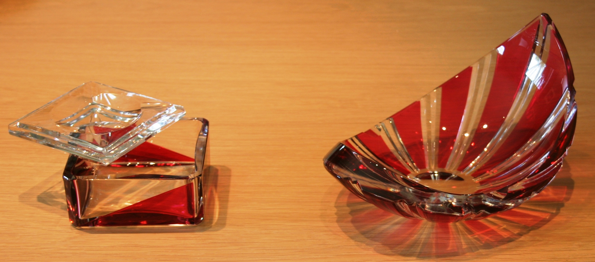 Val Saint Lambert aus de 60er Joren an zwou Faarwen eng Kéier glat an eng Kéier geschlaff glass art at Val-Saint-Lambert in Seraing/Belgium Auteur: Les Meloures